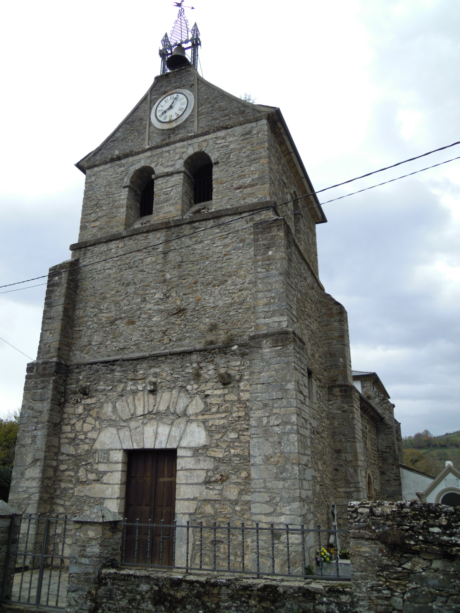 Igrexa parroquial de Doncos (As Nogais).